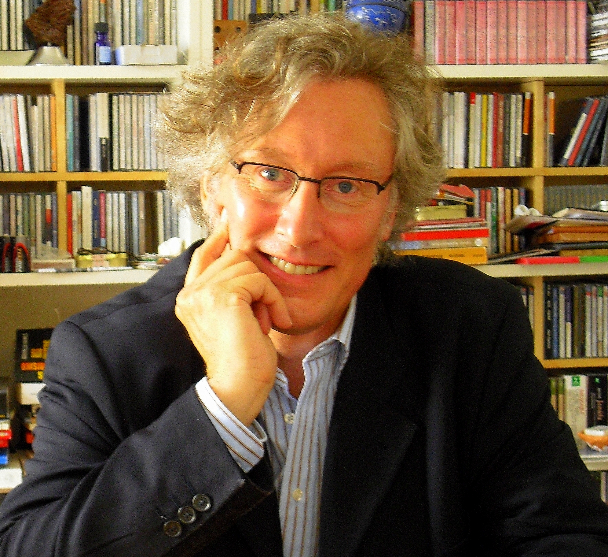 Porträt